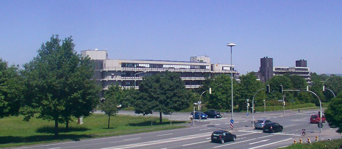 Universität Paderborn, fotografiert vom Südring-Einkaufszentrum aus.